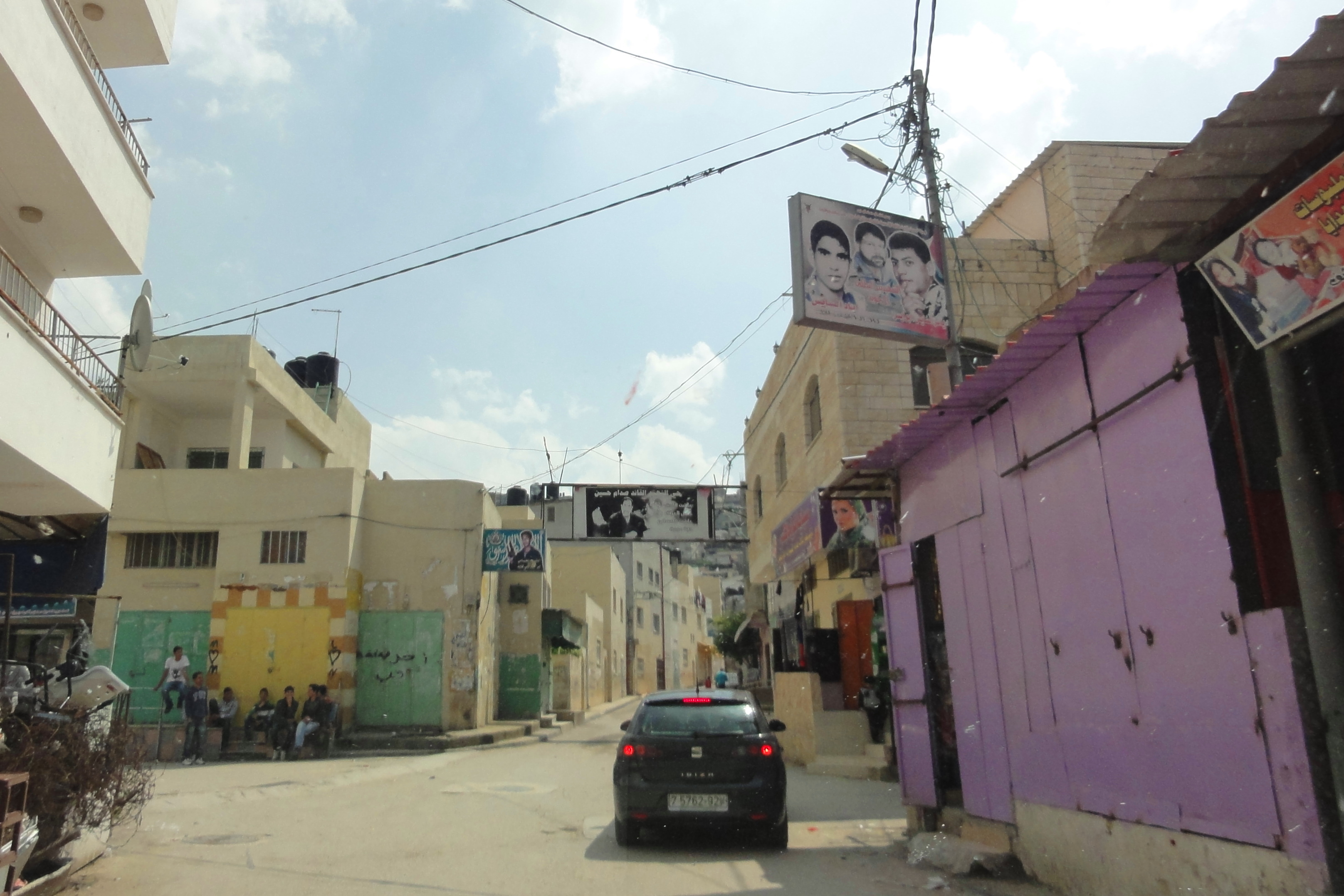 Jenin RC